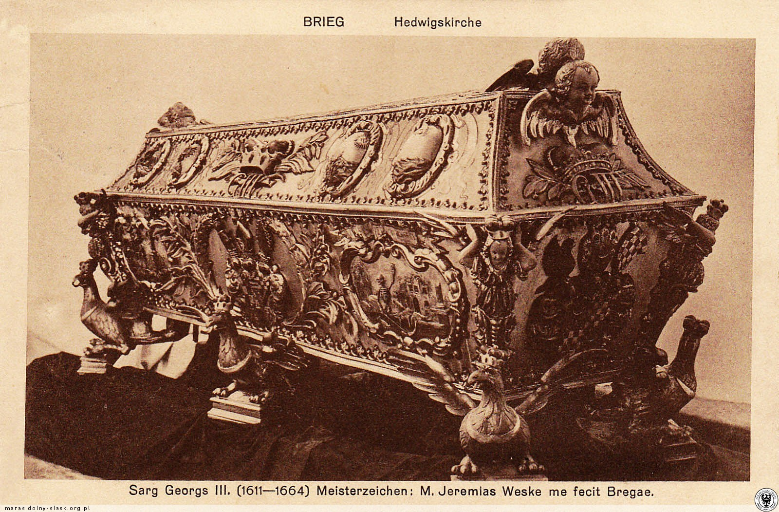 Sarg von George III., ein Werk von Jeremias Weske.